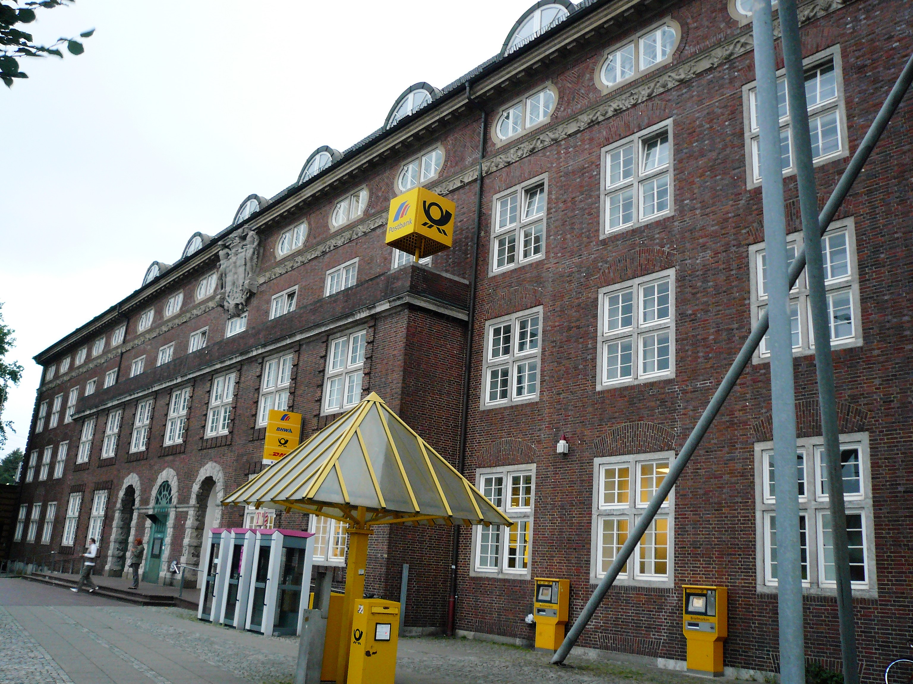 Das alte Hauptpostamt 5 in Bremen